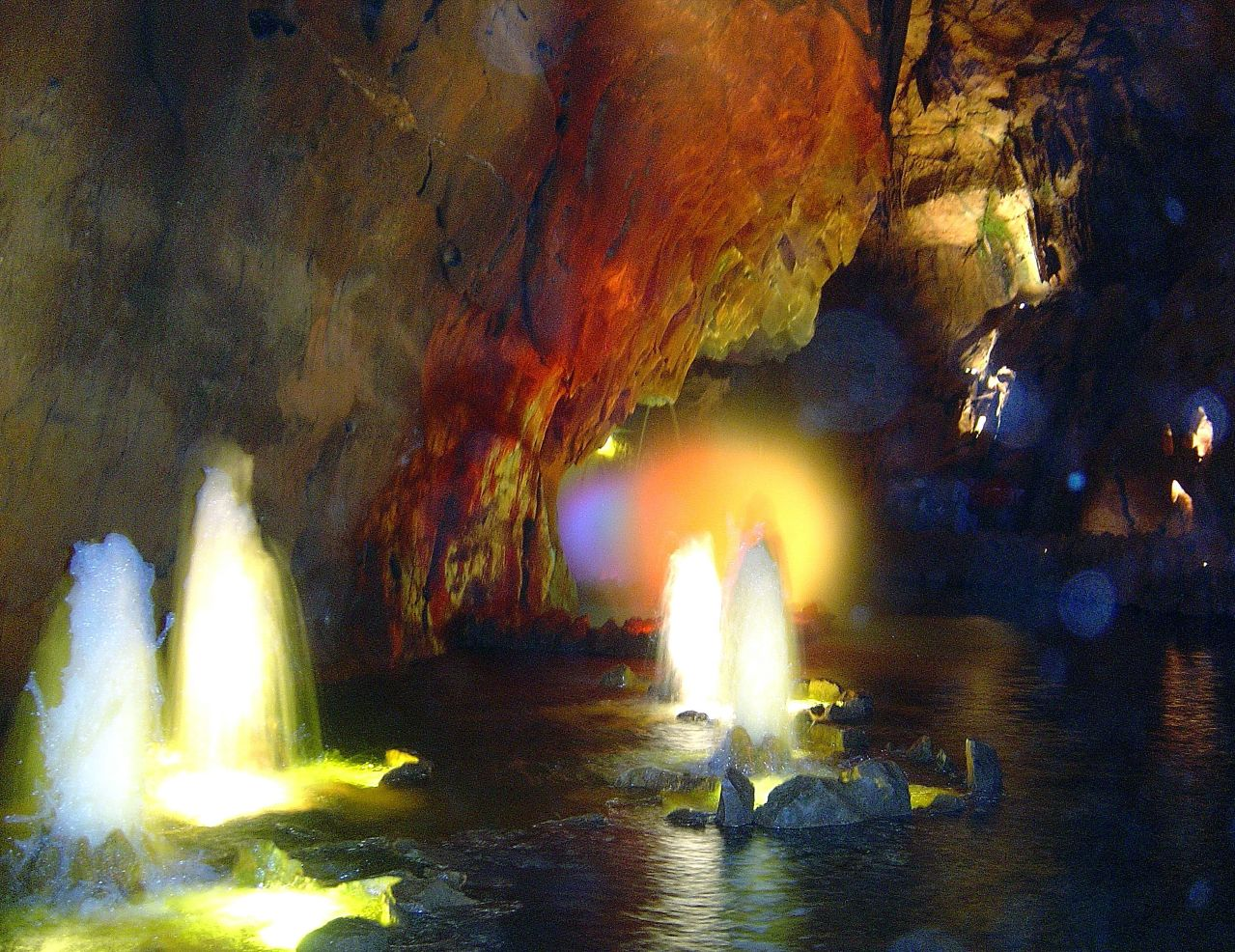 Grutas de Mira Daire (Portugal)